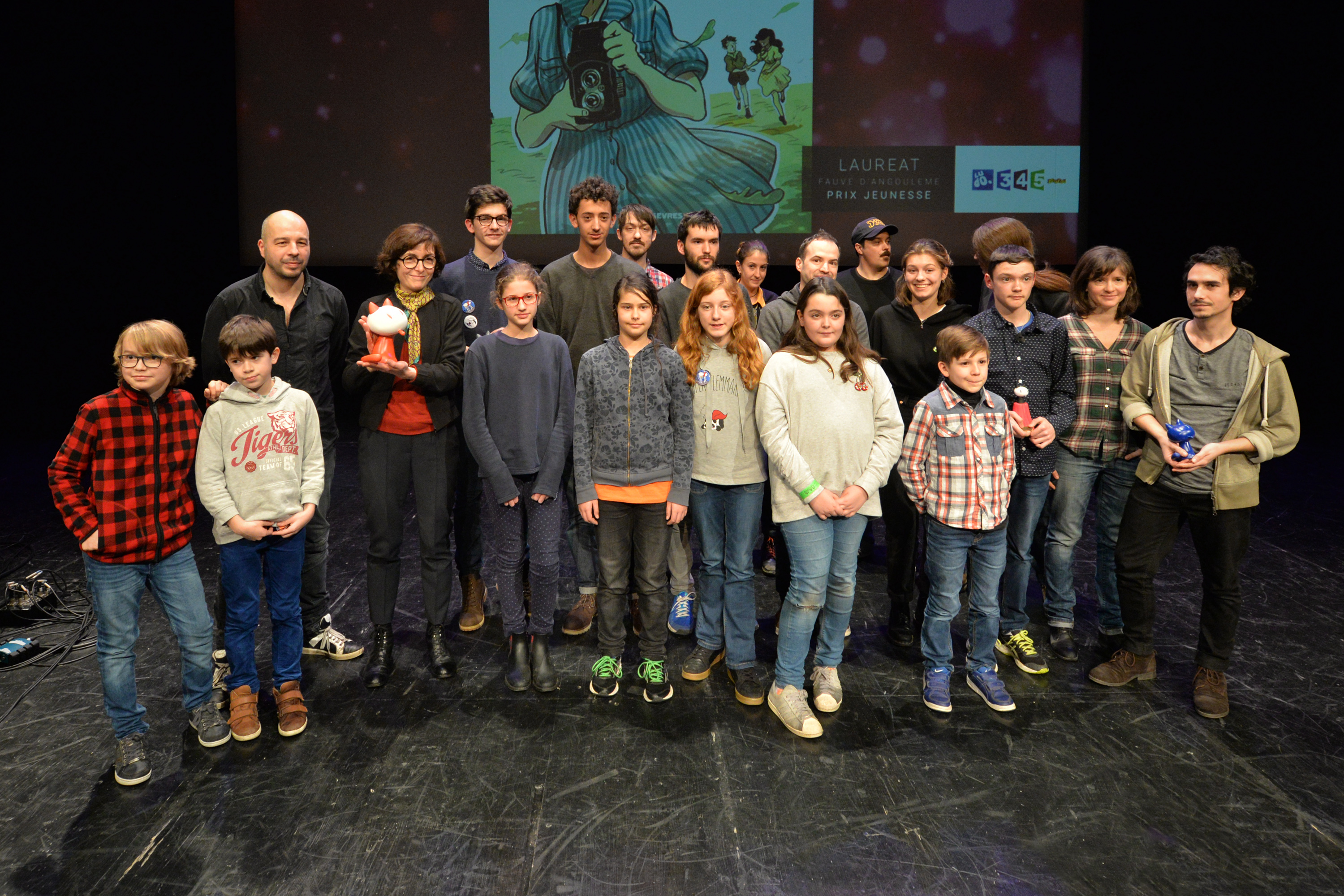 Lauréats des prix Jeunesse et Jeunes talents, Festival d'Angoulême 2018.